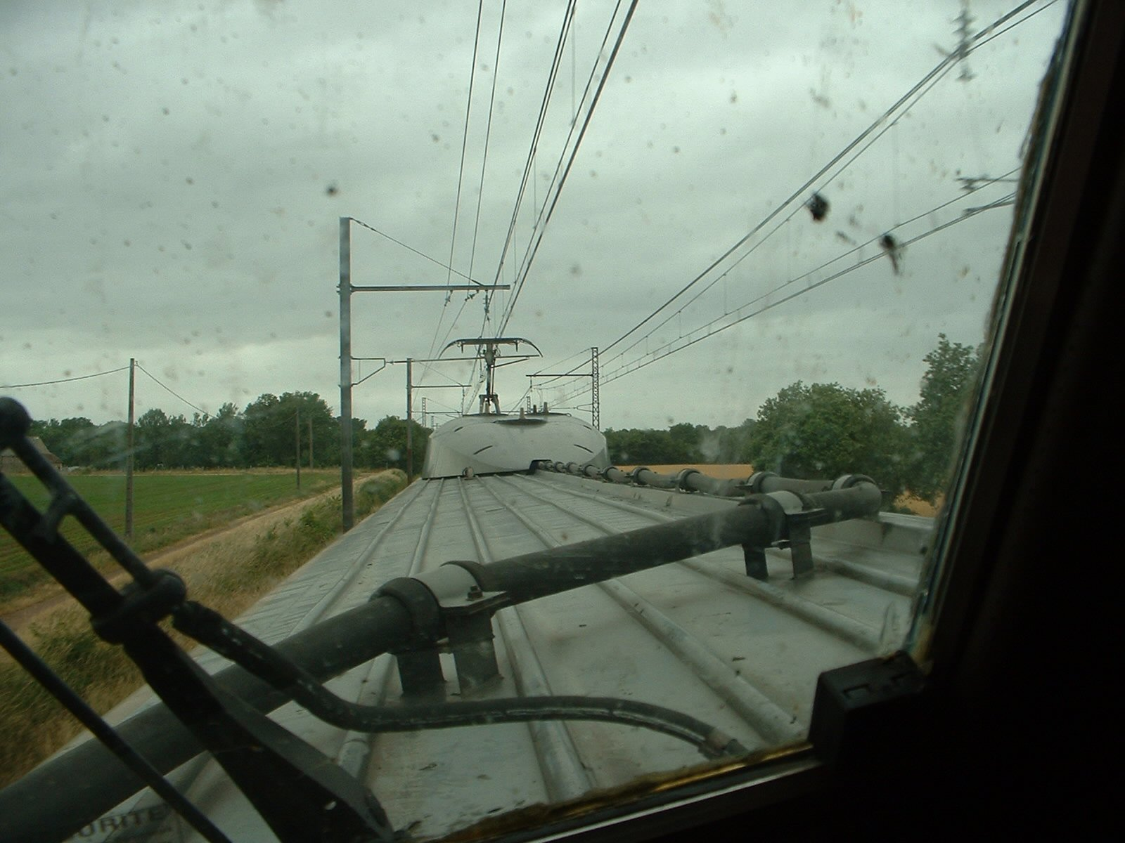 Vue sur caténaire 1500 volts continu depuis la vigie de la voiture de mesure Mélusine de la SNCF.